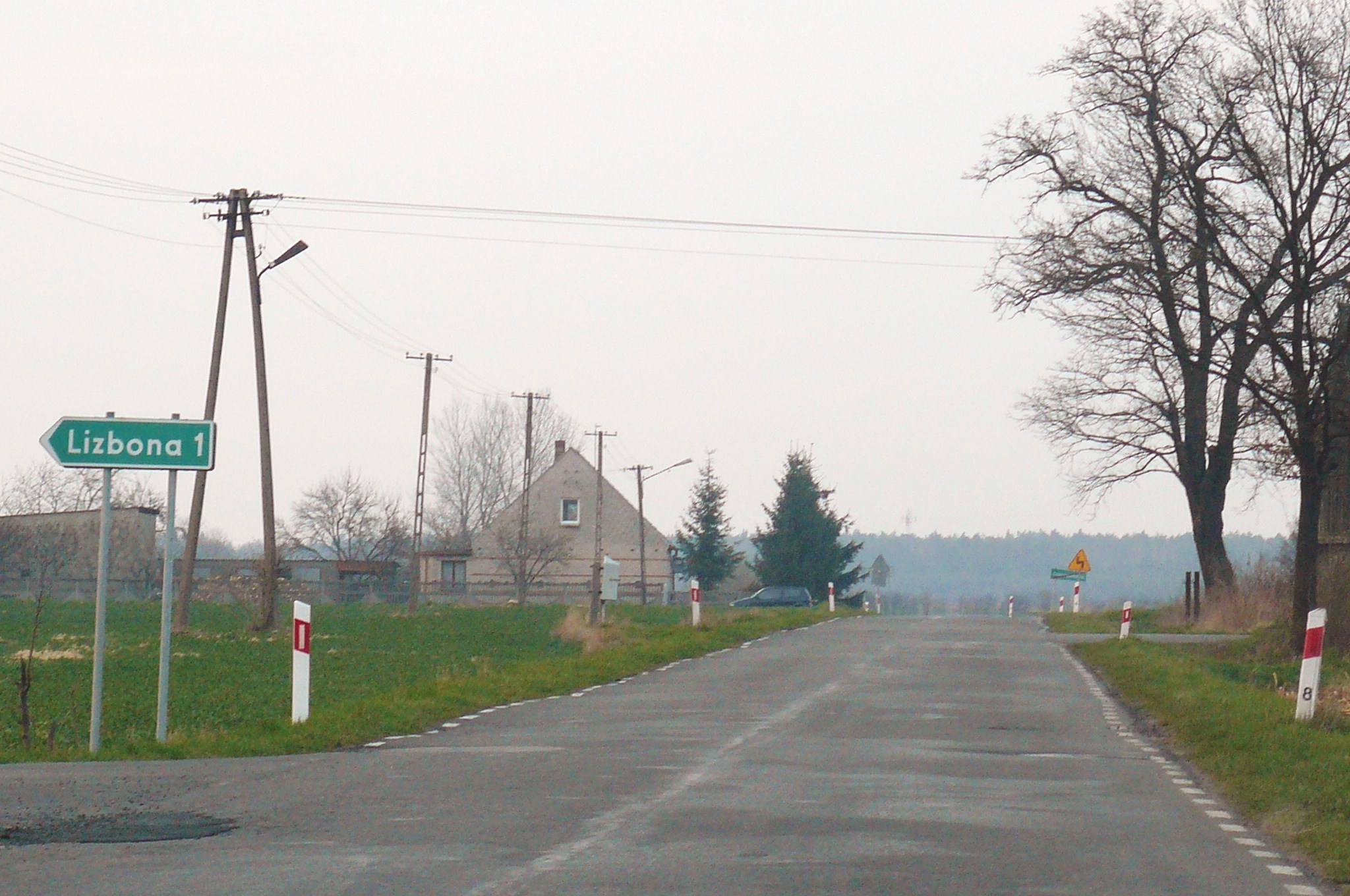 Droga woj. nr 117 w rejonie Dobrogostowa.